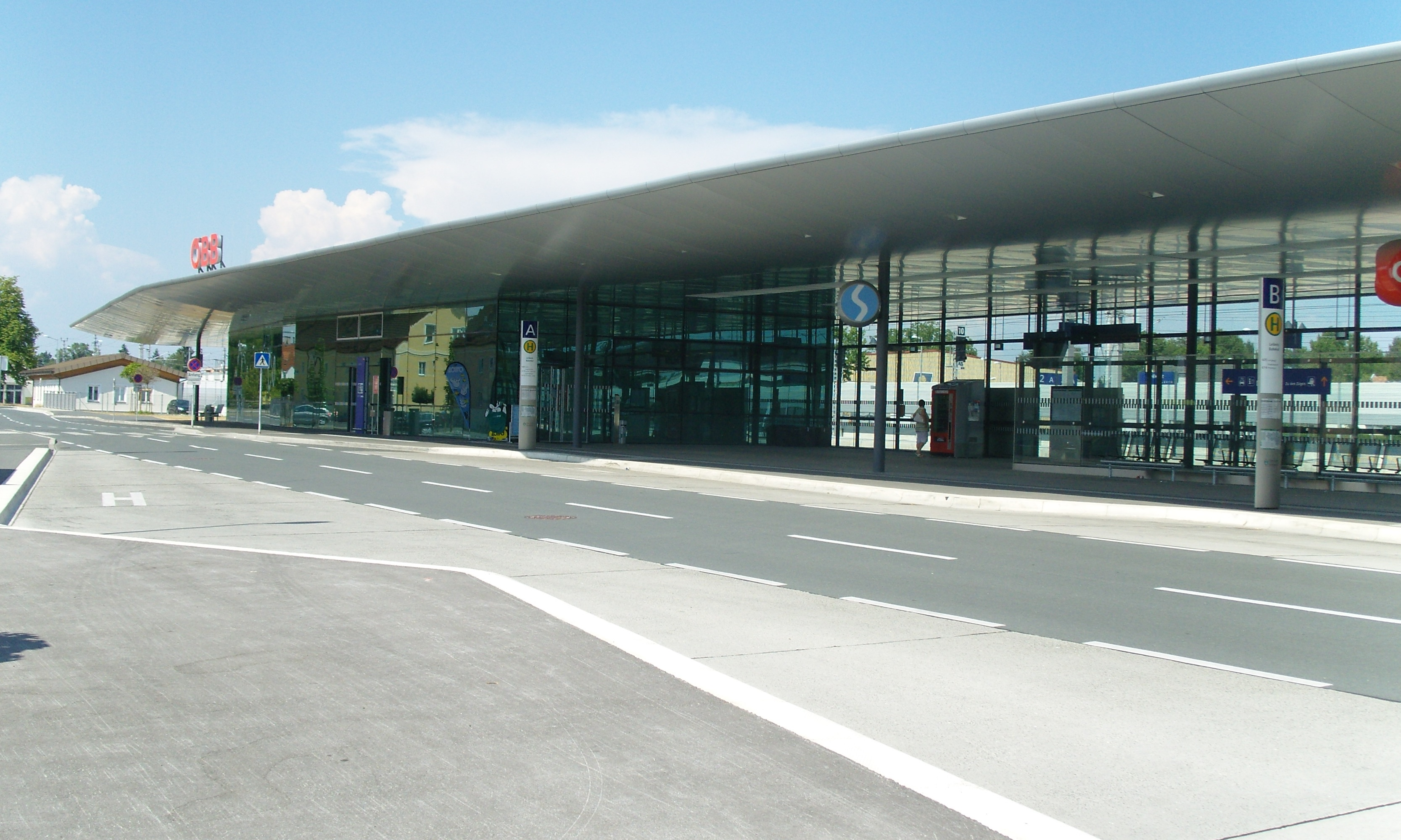 Bahnhof Leibnitz Neubau 2012, S-Bahn und Bushaltestelle